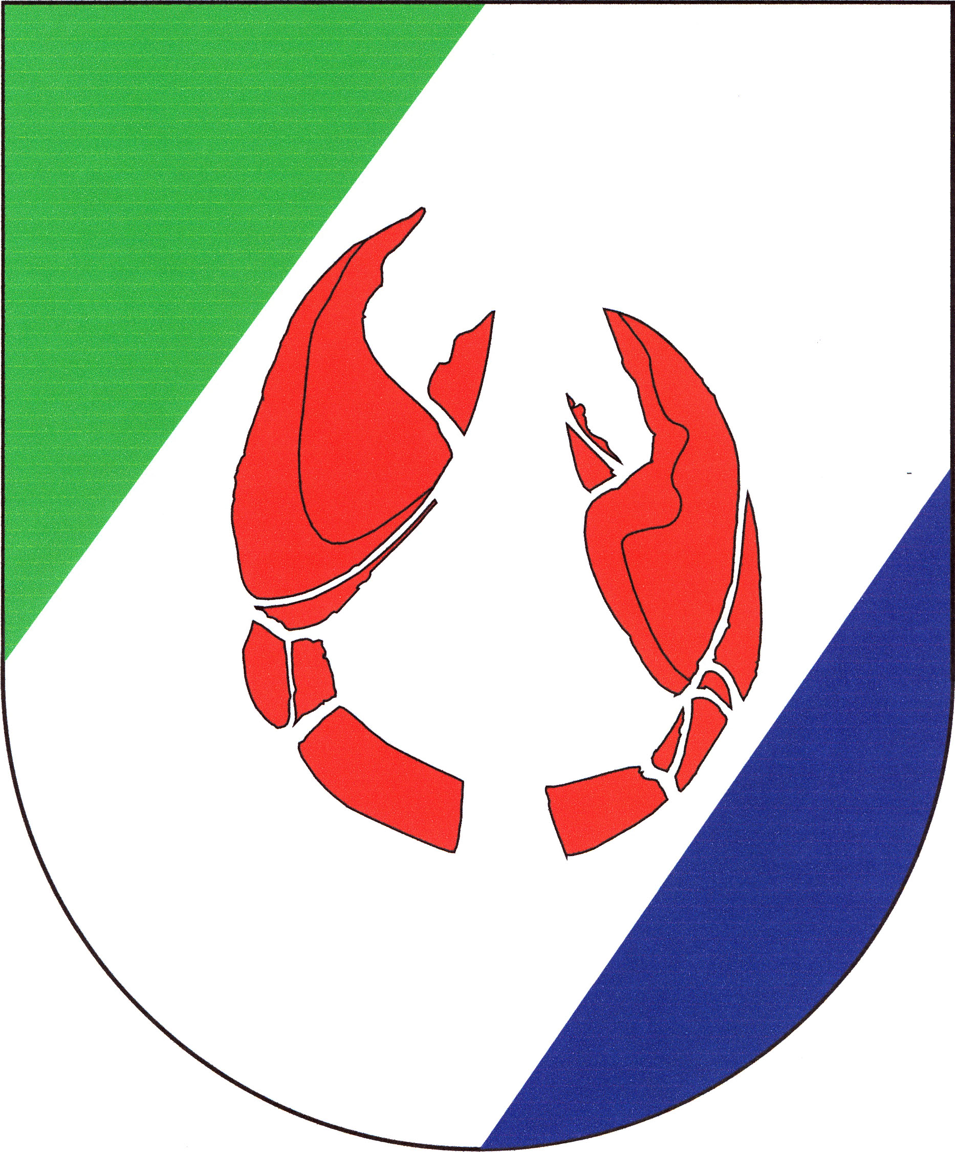 Znak obce Heroltice